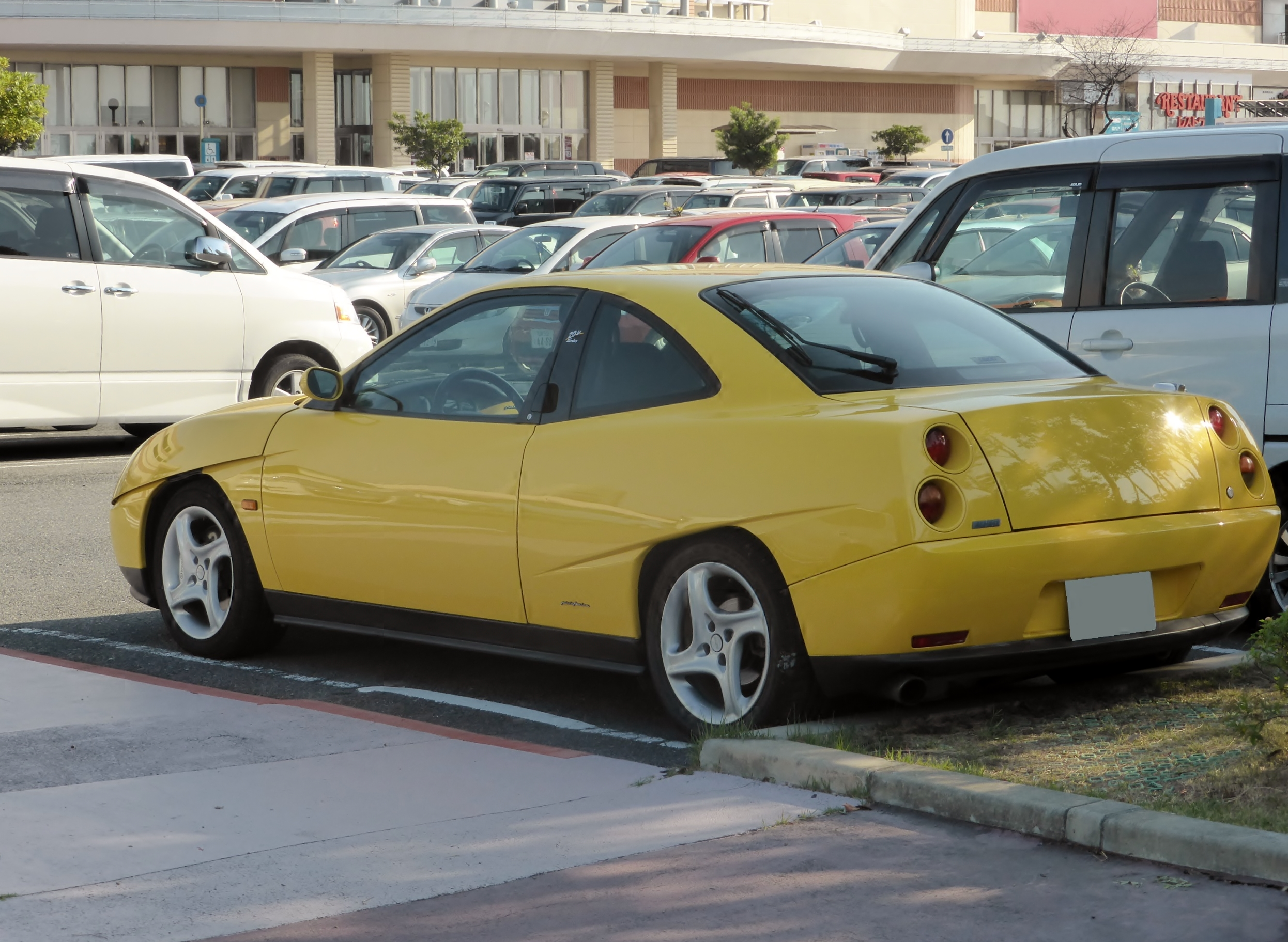 クーペ・フィアットをリアから撮影。